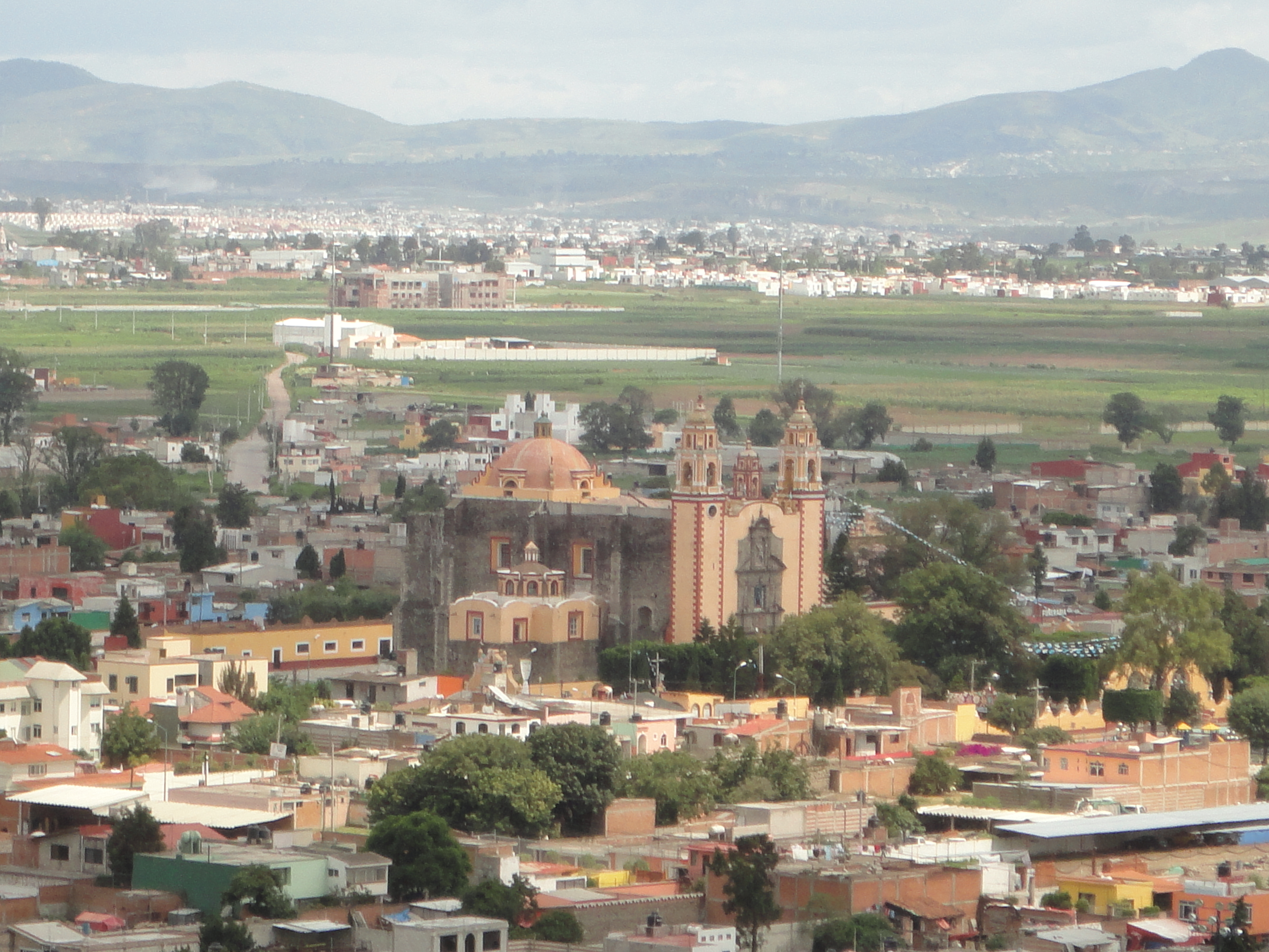 Parroquia San Andrés Cholula